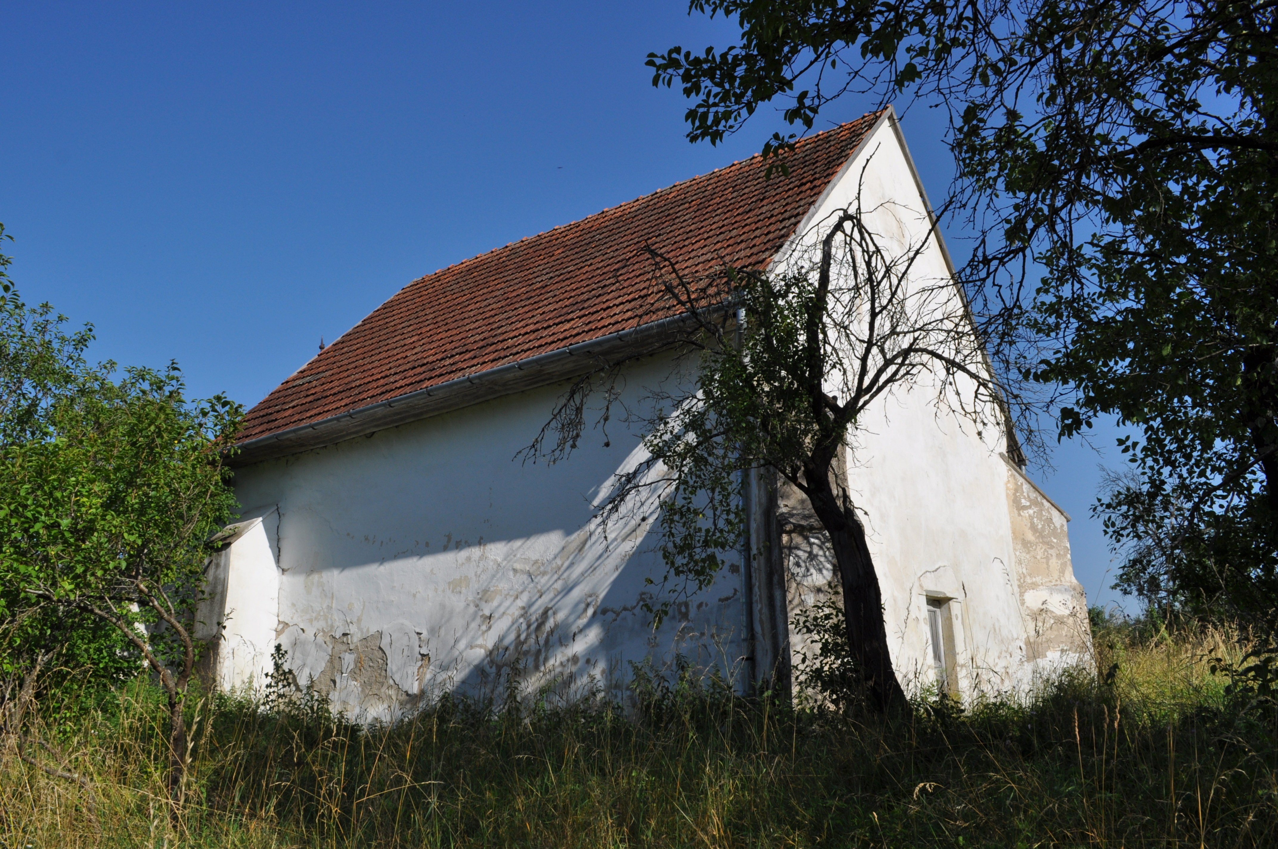 Biserica reformată, sat SFĂRAŞ; comuna ALMAŞU 01